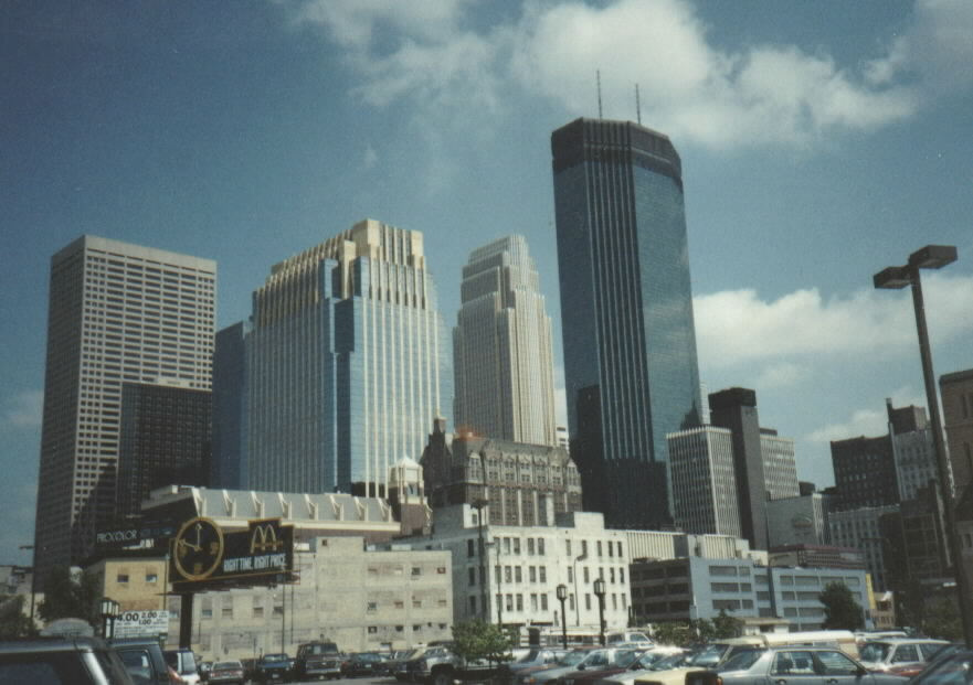 Minneapolis